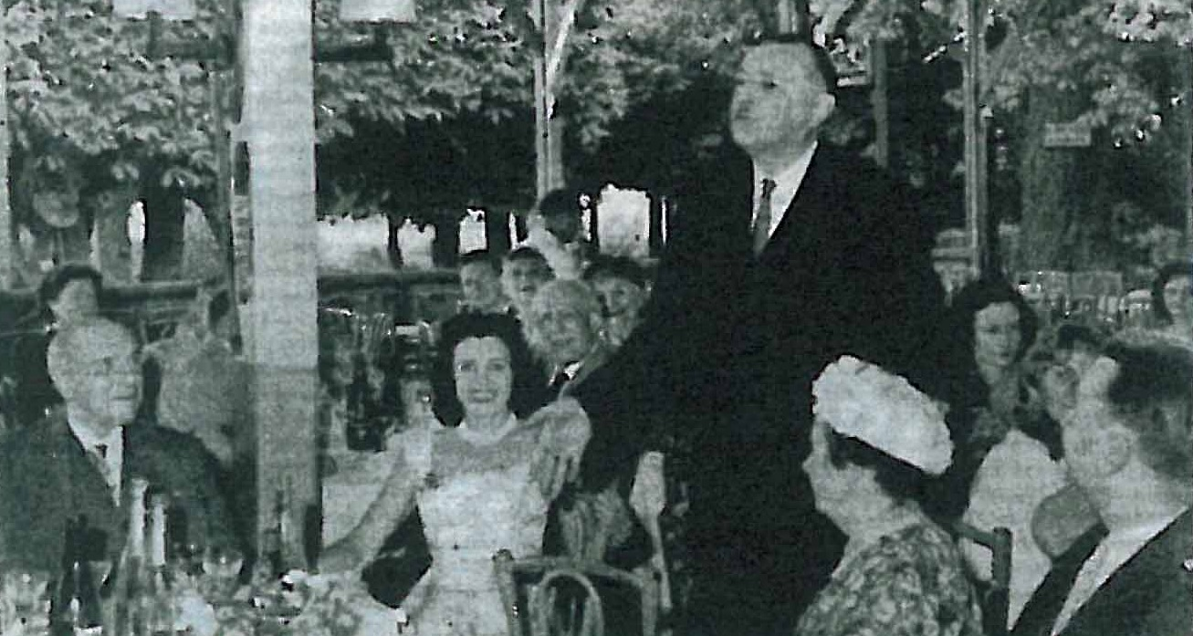 Banquet avec le président Fourcade